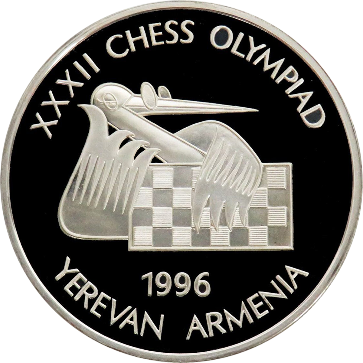 Памятная монета Армении 1996 года, посвящённая 32-й шахматной Олимпиаде - 100 драм - серебро 925